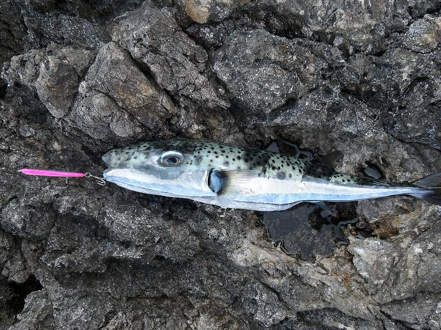 Lagocephalus sceleratus collected in Karpathos island, Greece. Released after photo.